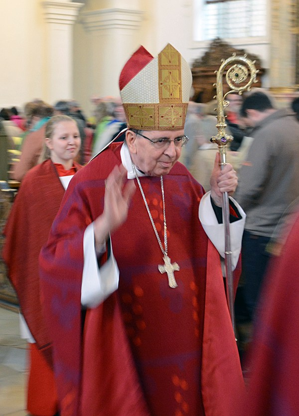 Kardinal Kurt Koch am Pontifikalamt des Blutritts zu Weingarten im am 15. Mai 2015